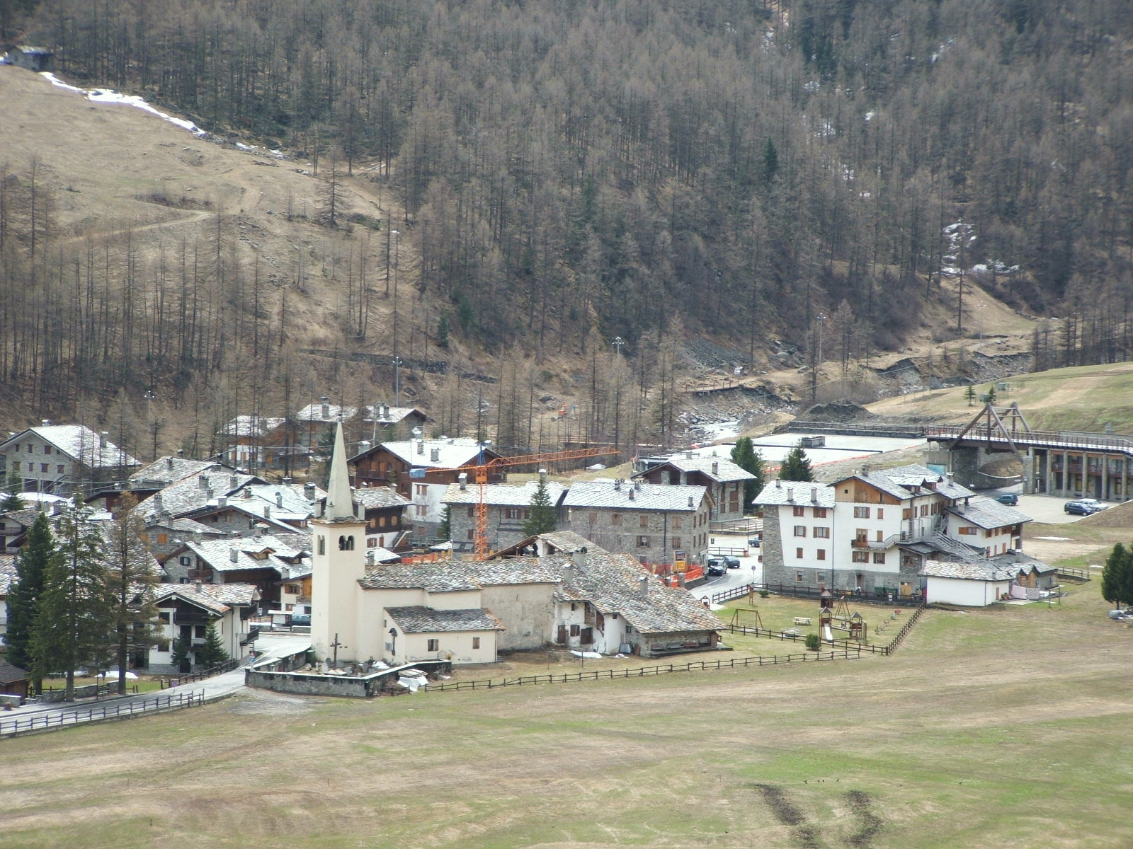 Rhêmes-Notre-Dame, panorama